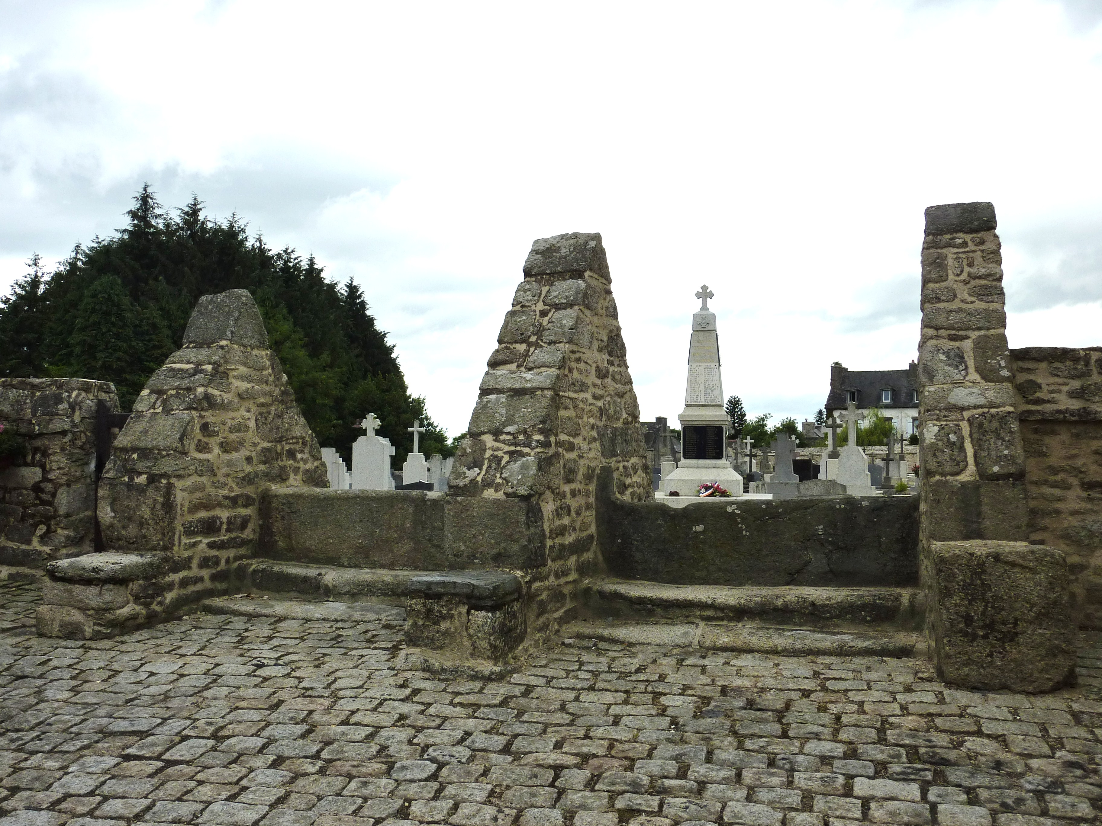 Berrien: entrée de l'enclos paroissial: échaliers (dalles de schistes empêchant l'entrée des animaux)